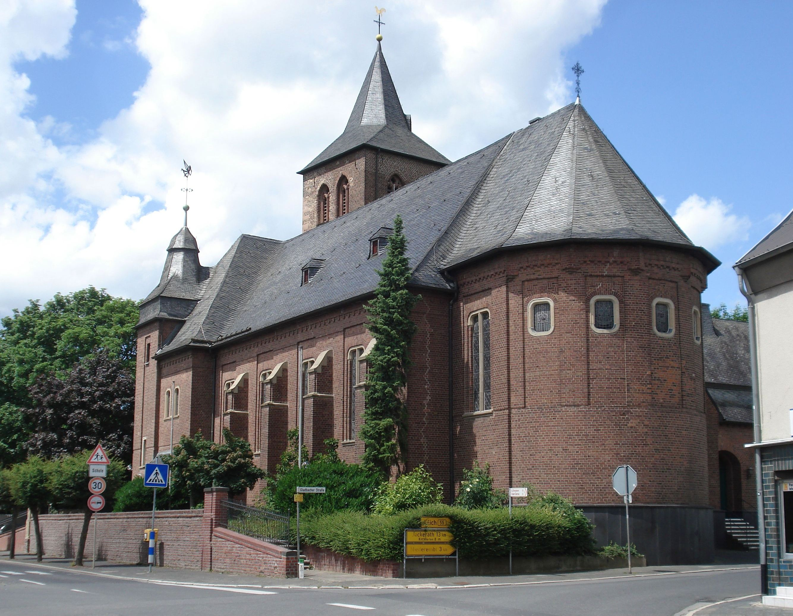 Pfarrkirche St. Laurentius, Elsdorf-EschThis is a photograph of an architectural monument.